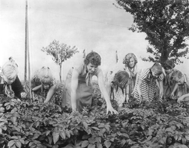 Nessa, Kartoffelkäferbekämpfung Zentralbild Krueger Schmidt 10.8.1958 ADN Teletoto Der Marsch nach Halle hat begonnen. Nach ihrer ersten Nacht in den von der Bevölkerung der gastgebenden Orte mit viel Liebe hergerichteten Quartieren begannen die Teilnehmer des Friedensmarsches ihre große Wanderung auf 15 verschiedene Hauptrouten nach der Stadt des III. Pioniertreffens. UBz: Auf dem Marsch von Tsuchern nach Weissenfels sind die Pioniere der Fröbelschule von Zwickau-Stadt auf dem Kartoffelfeld des Einzelbauern Walter Gröne in Nessa beim Kartoffelkäfersuchen.